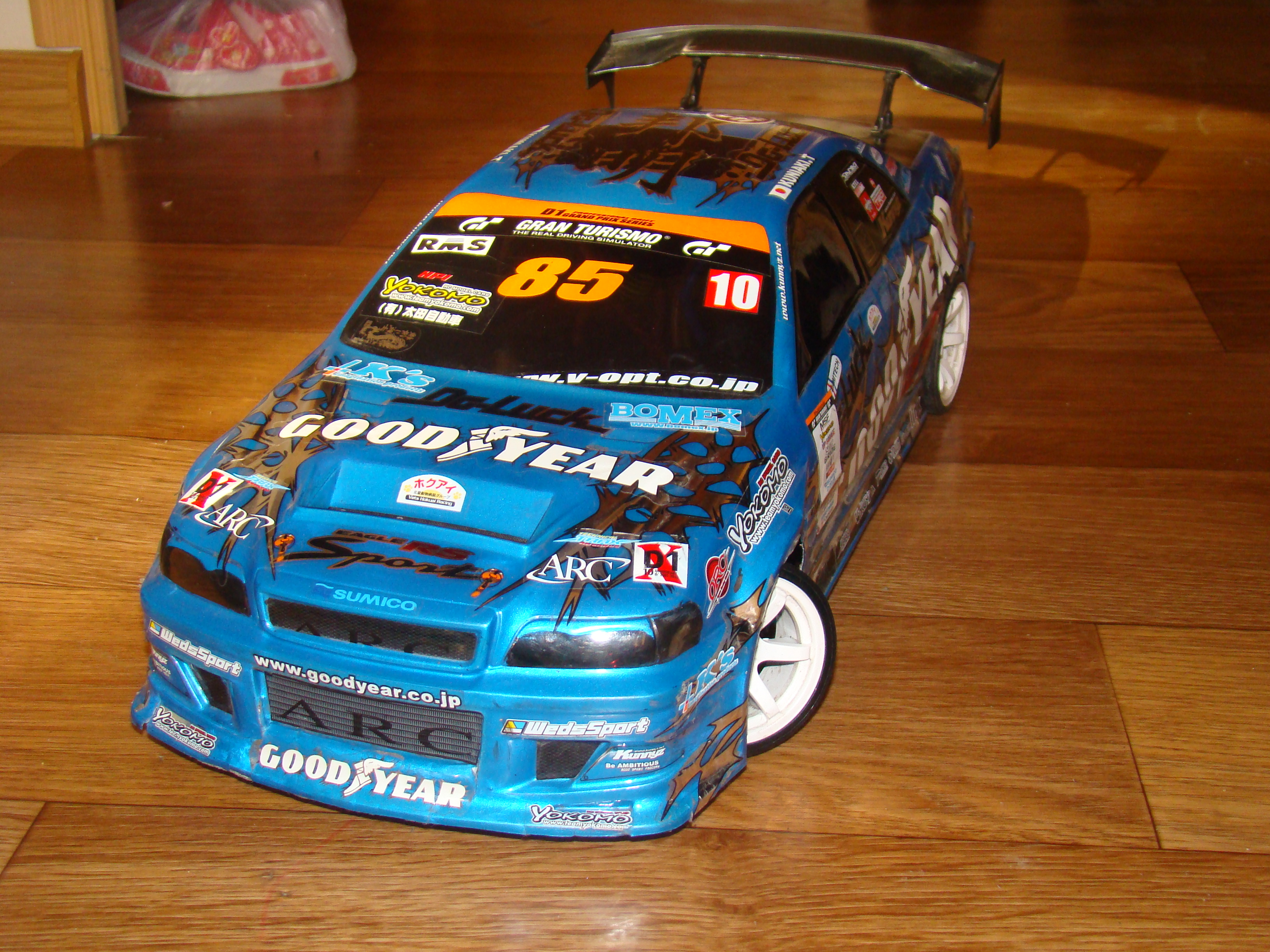 Автомодель для дрифта. Дмитрий "Yakuzzza" Алексеюк .ua